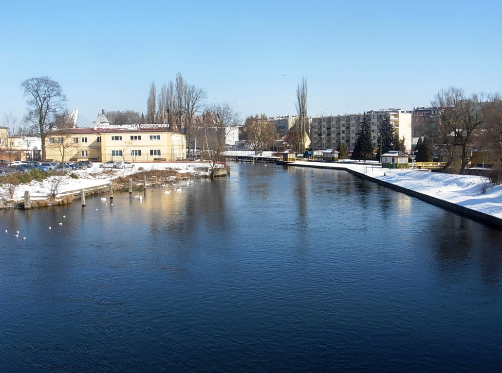 Rzeka Młynówka (odnoga Brdy opływająca Wyspę Młyńską) w Bydgoszczy